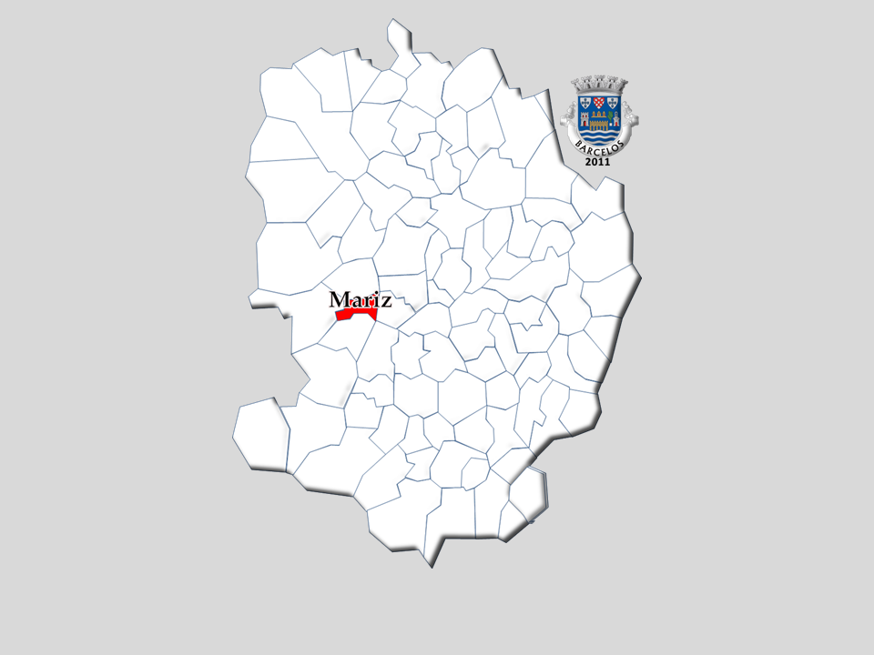 Cenos 1864/2011